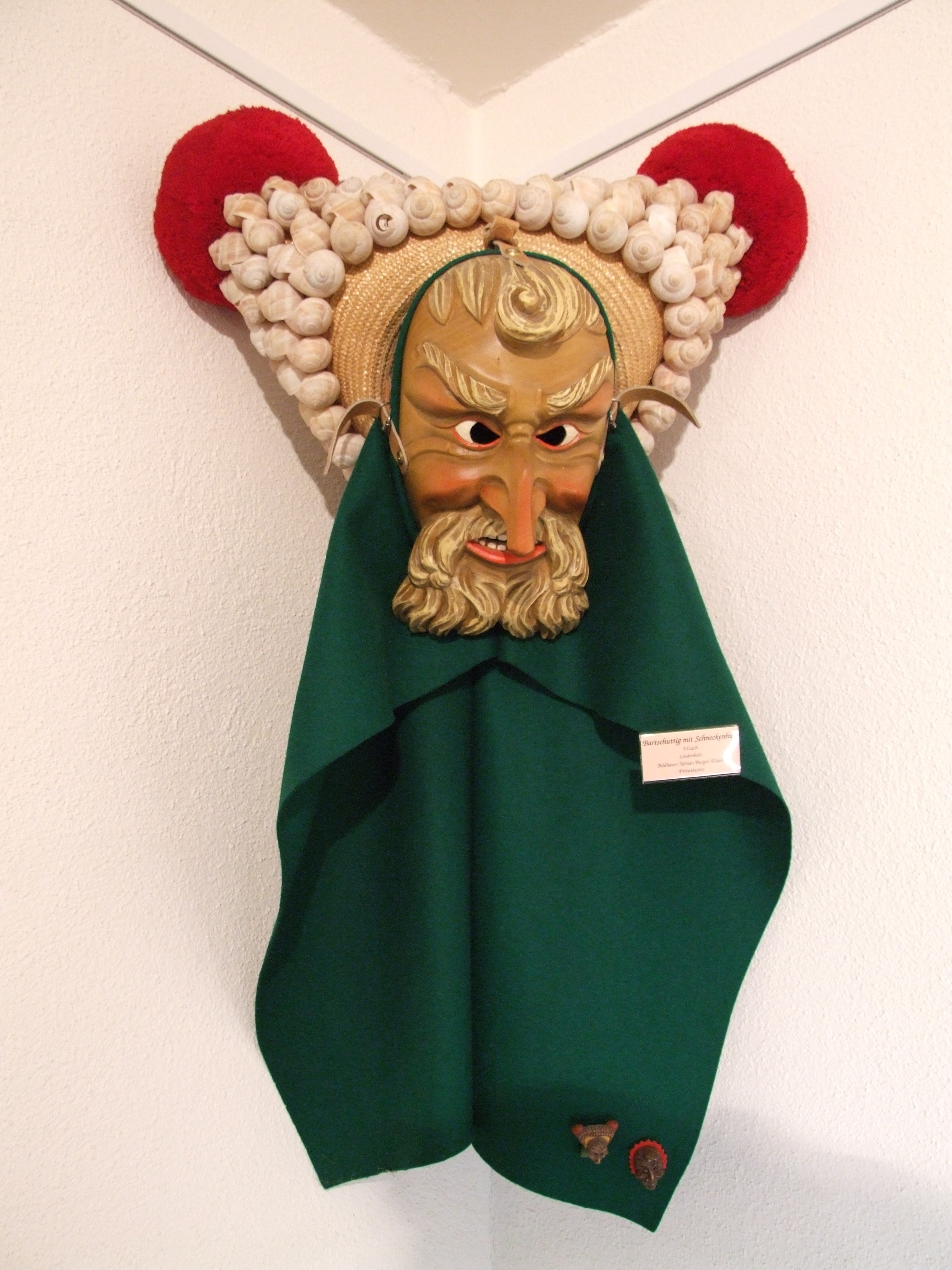 Bartlarve mit Hut aus Elzach, geschnitzt aus Lindenholz von Adrian Burger